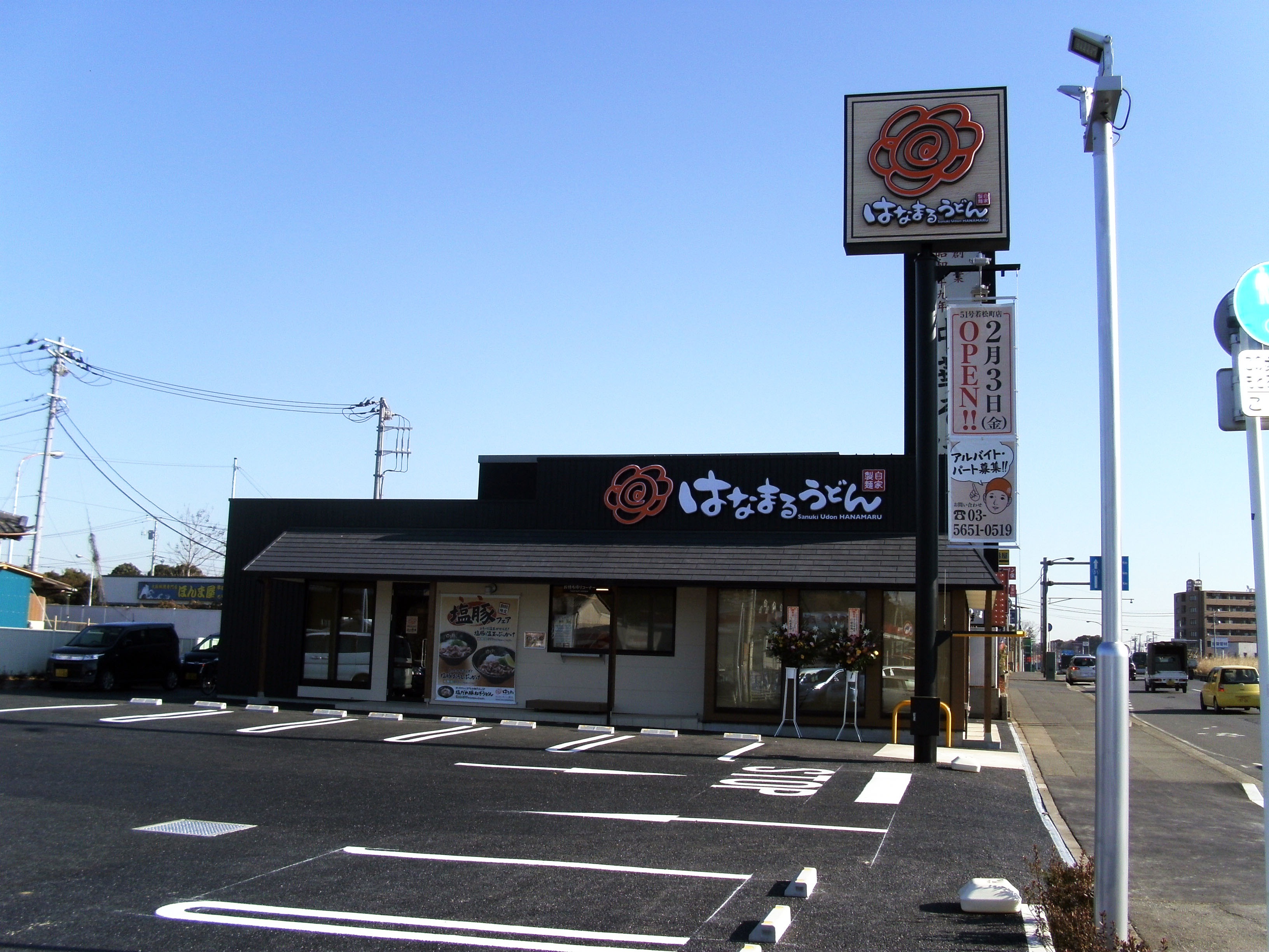 はなまるうどんの外観